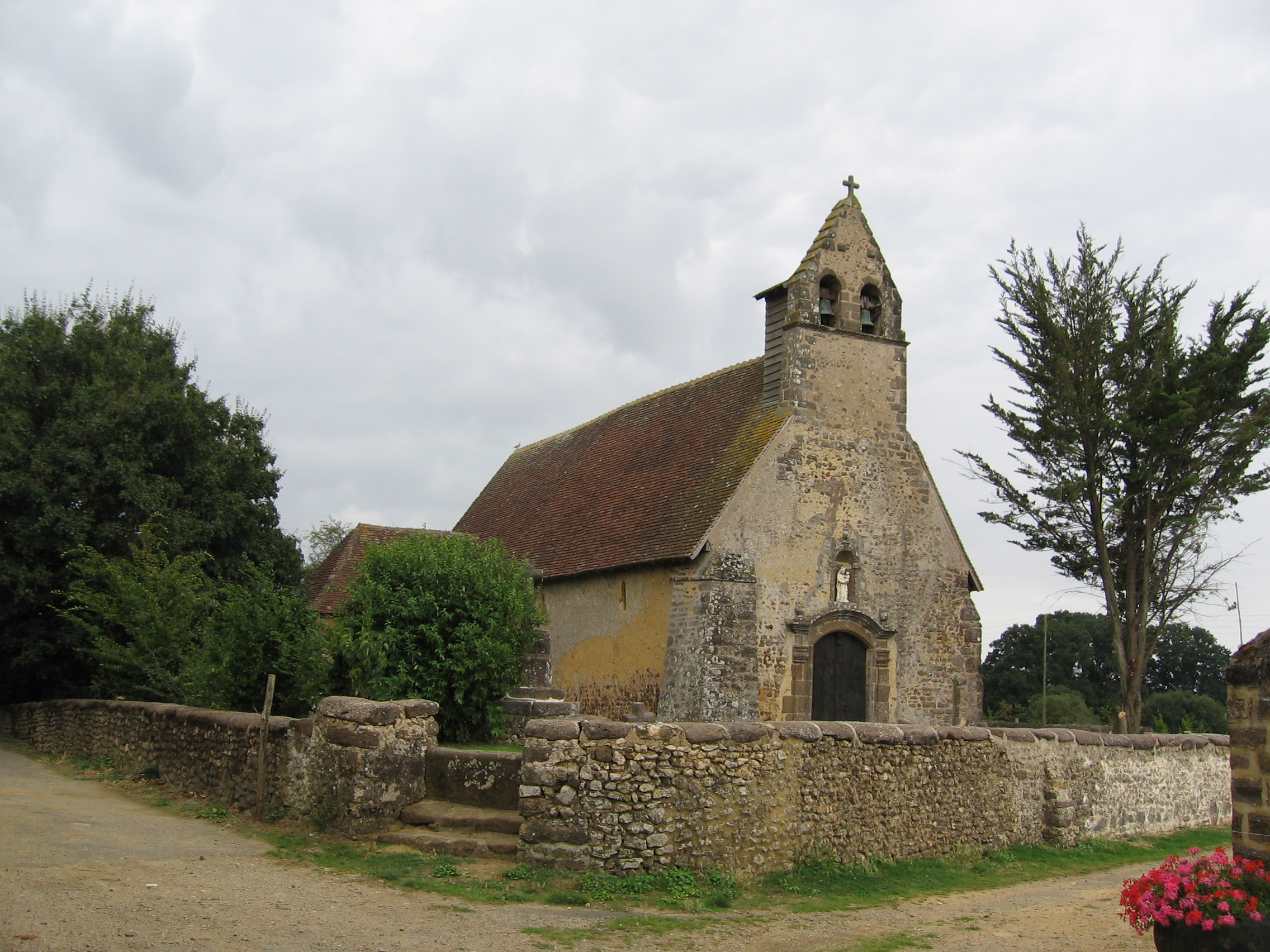 La chapelle Notre-Dame des Champs, à Saint-Jean-d'Assé (Sarthe, France), sur la route de Saint-Jacques de Compostelle